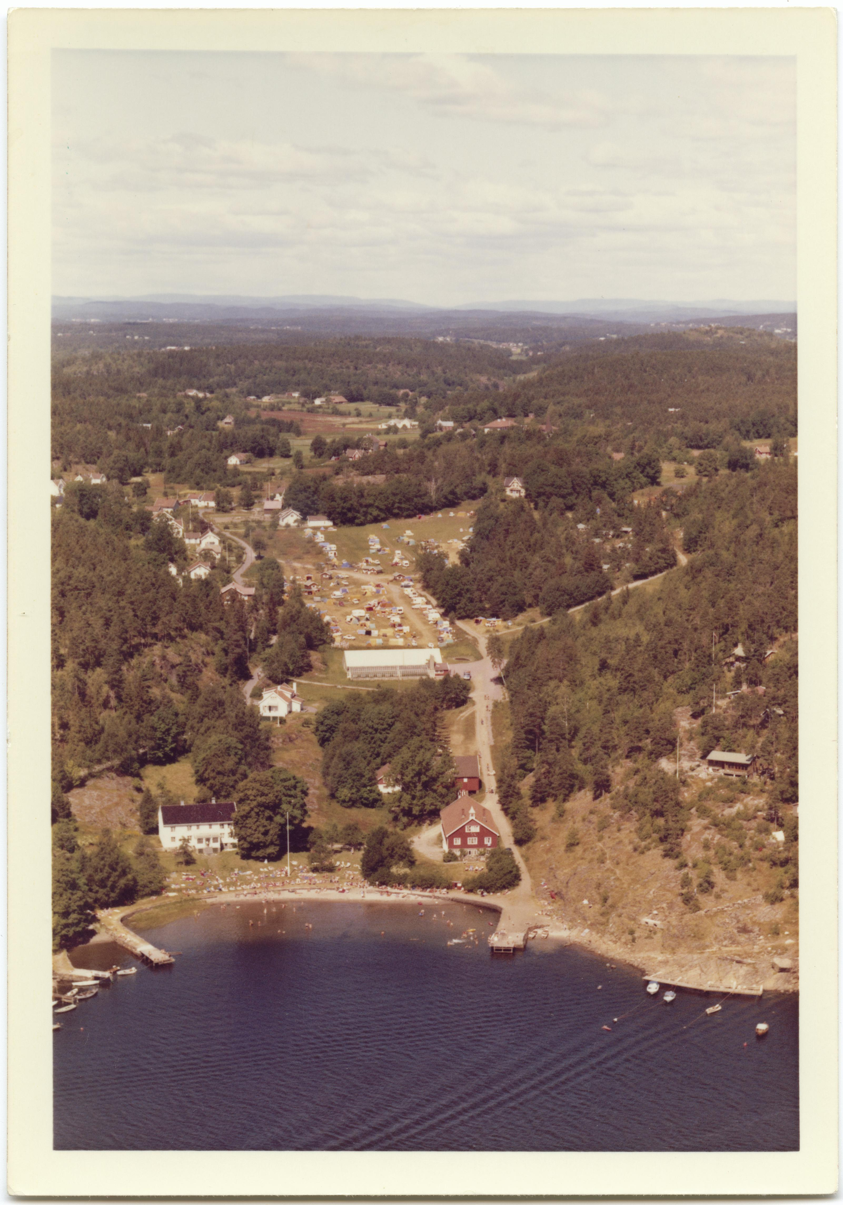 WF.S.178955 Stranda Gård, Årøsundet